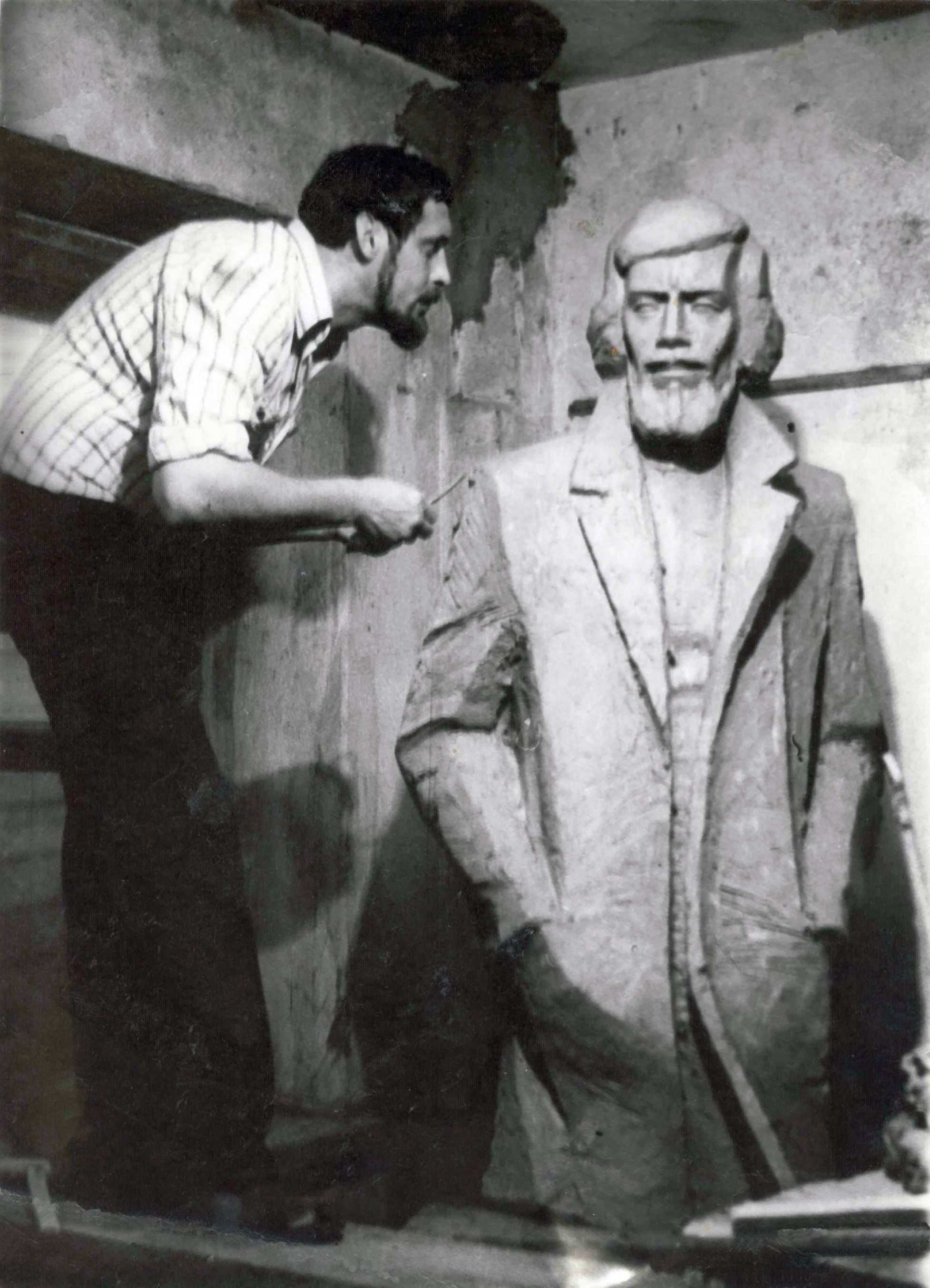 К. Козловский за работой над памятником В. Новаху. 1982 г.